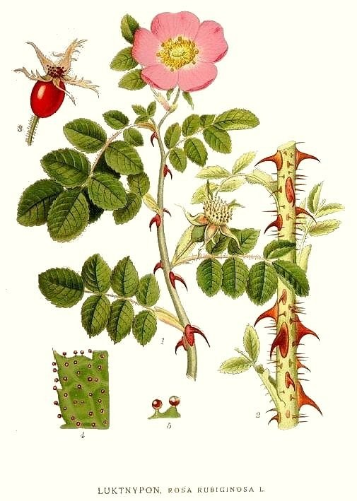 Rosa rubiginosa L. Original Description Luktnypon, Rosa rubiginosa L.